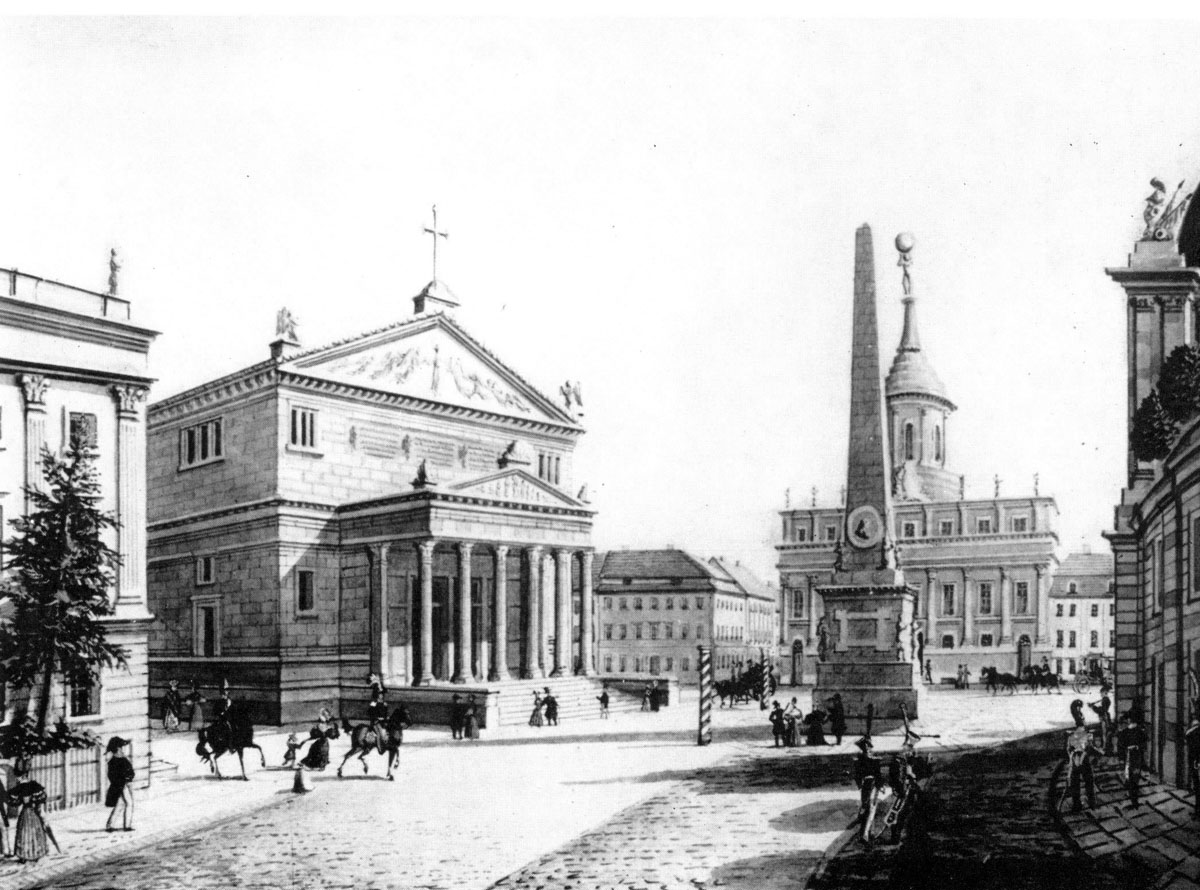 Alter Markt in Potsdam (Old Market in Potsdam). Links die Nikolaikirche noch ohne Kuppel, in der Mitte das Alte Rathaus und rechts die Außenwand des Stadtschlosses.